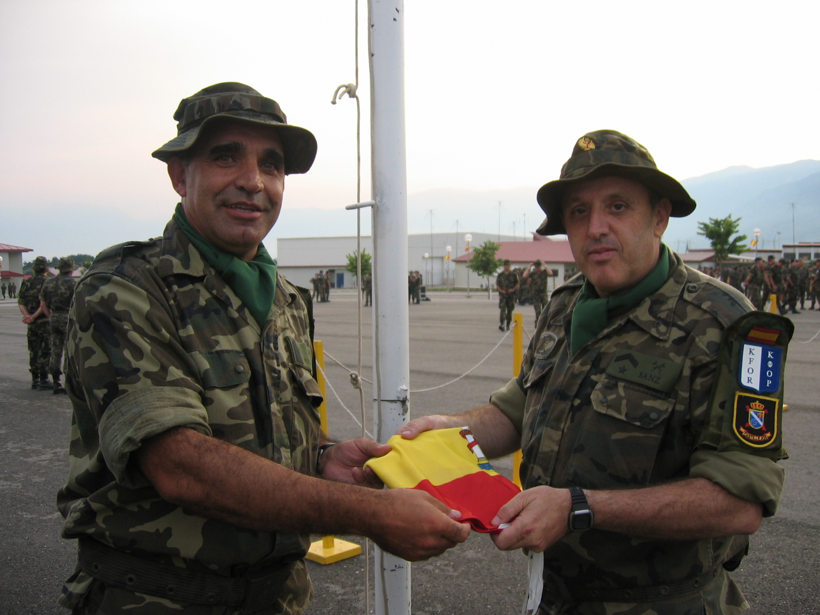 El saliente entrega la bandera al nuevo mando de la mison KFOR